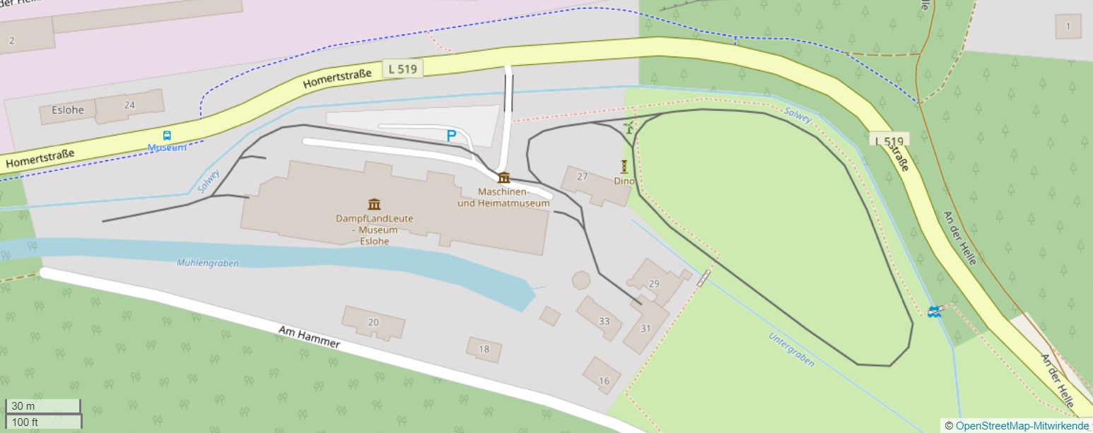 DampfLandLeute-Museum Eslohe (OpenStreetMap)